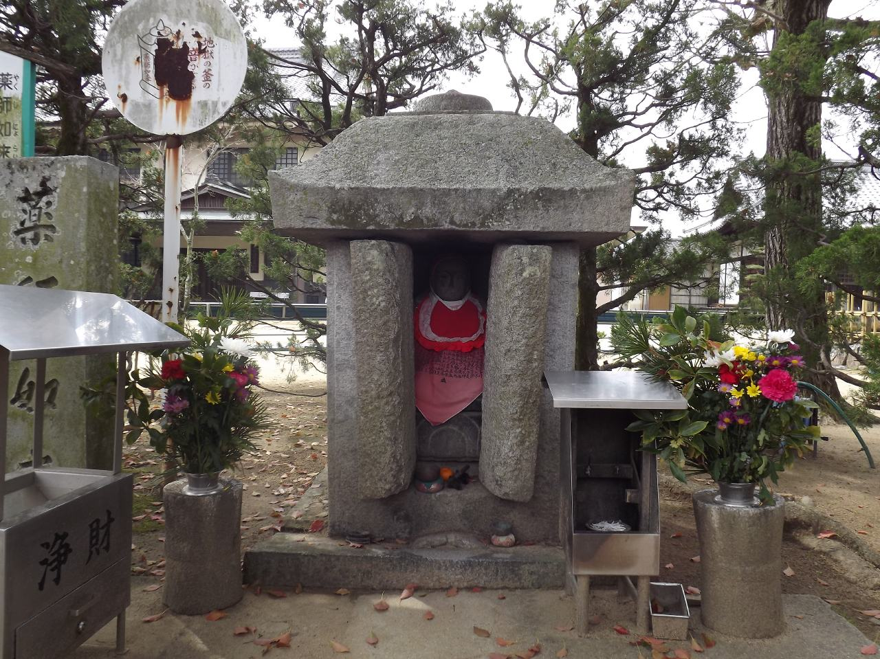 頭を入れるとゴーと音がする一宮寺のお薬師さん